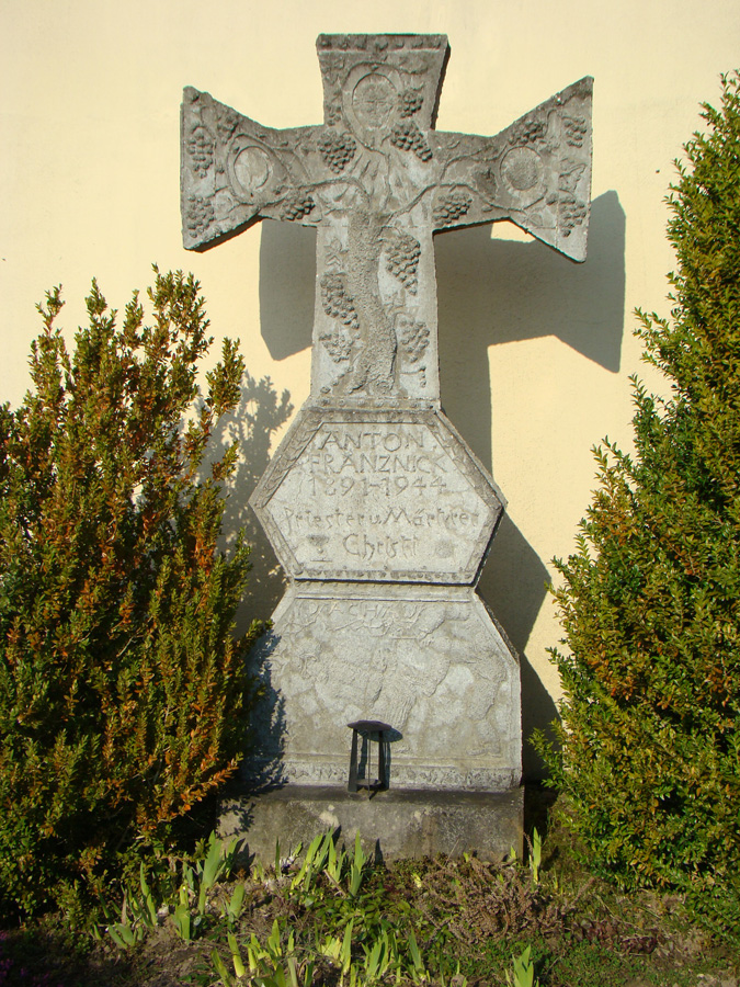 Fränznick-Gedenkkreuz in Rohrbach am Gießhübel